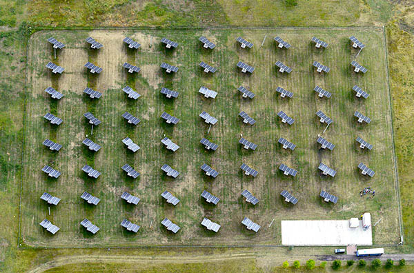 Légi fotó az újszilvási napelemparkról